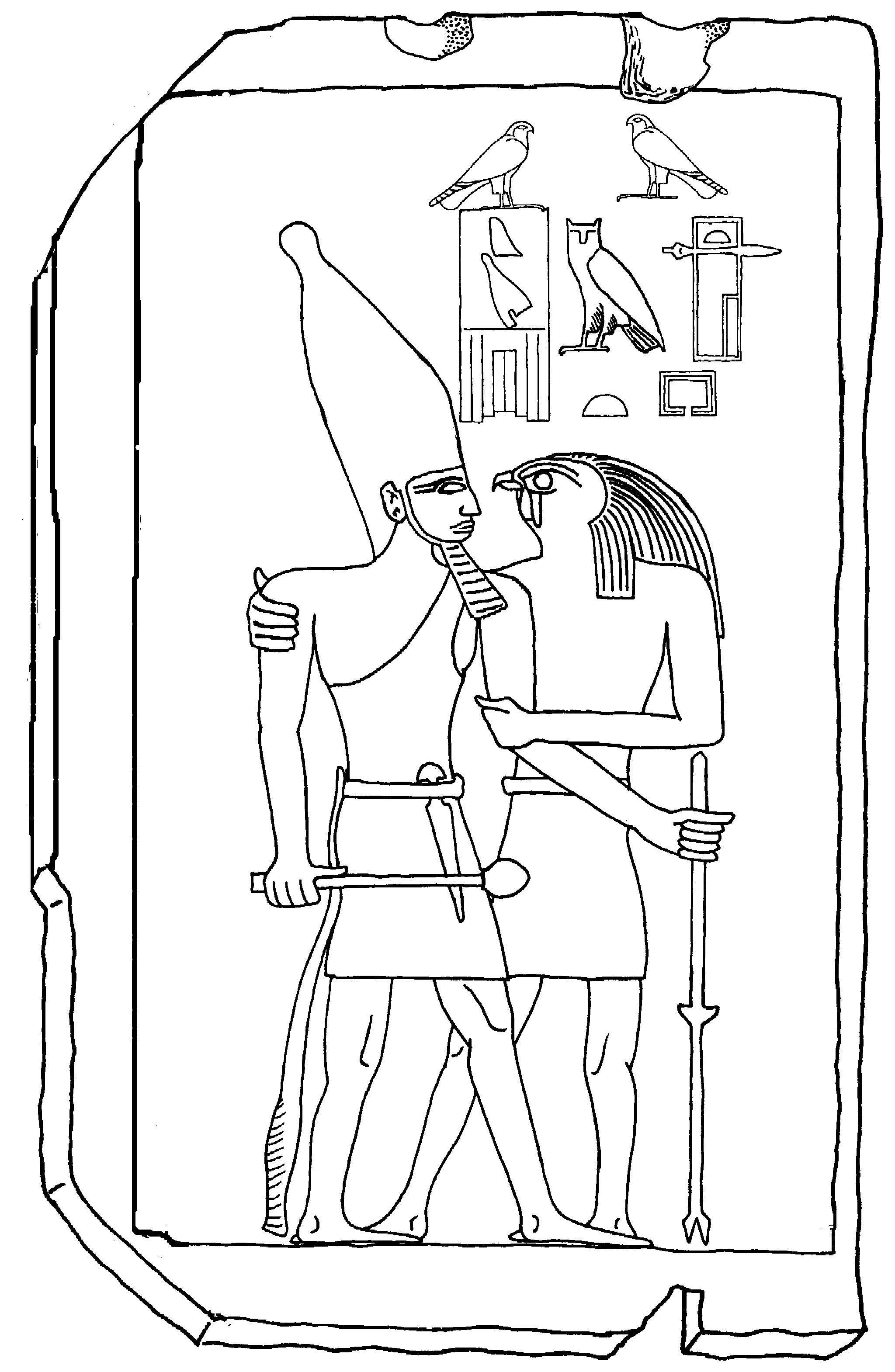 Stela of king Hor-Qahedjet, unknown provenance